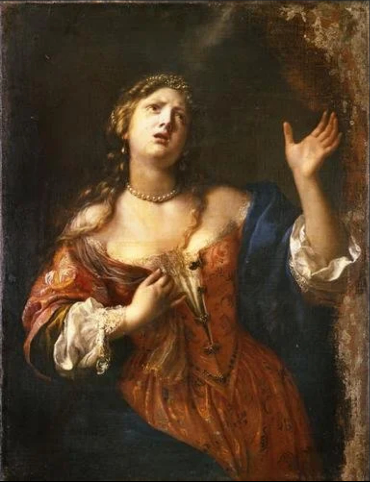 Semíramis